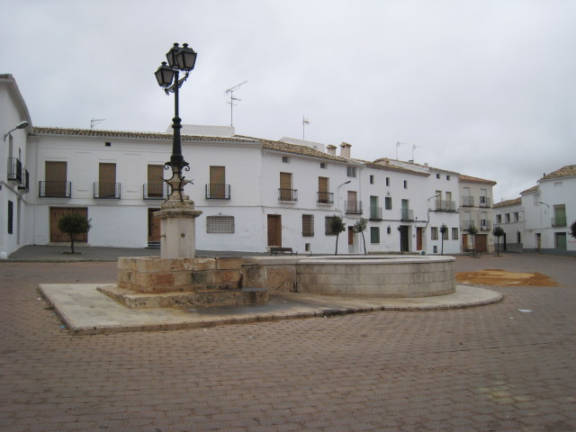 Plaza del Pueblo de Torrejoncillo del Rey, Cuenca.